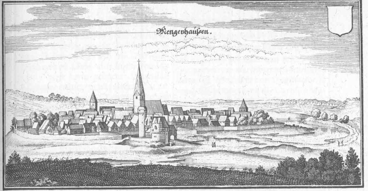 Kupferstich von Matthäus Merian der Stadt Mengeringhausen in Topographia Hassiae, Faks. d. 2. Ausg. von 1655, S. 107